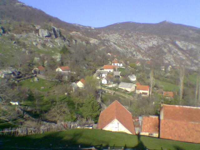 Selbst erstelltes Bild von Lukavac, Republika Srpska.